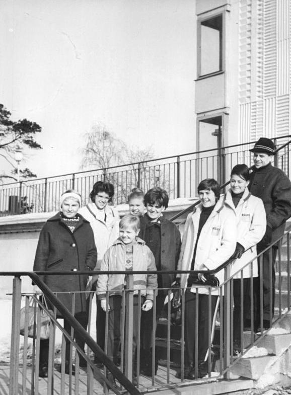 Berlin, Müggelturm, Eisschnellläuferinnen Zentralbild Studré 22.2.1964 Amerikanische Eisschnellläuferinnen starten in Berlin Während ihres Aufenthaltes in Berlin machten die amerikanischen Eisschnellläuferinnen einen kleinen Ausflug zum Müggelturm. vlnr: Jeanne Ashworth, Barbara Lockhart, Sylvia White, Helga Haase (DDR, mit Tochter Havor), Janice Smith, Marie Lawler und DDR-Trainer Helmut Haase. Die amerikanischen Olympia-Teilnehmerinnen starten am 22. und 23.2.1964 bei den internationalen Eisschnelllauf-Wettbewerben der Frauen im Berliner Dynamo-Sportforum.